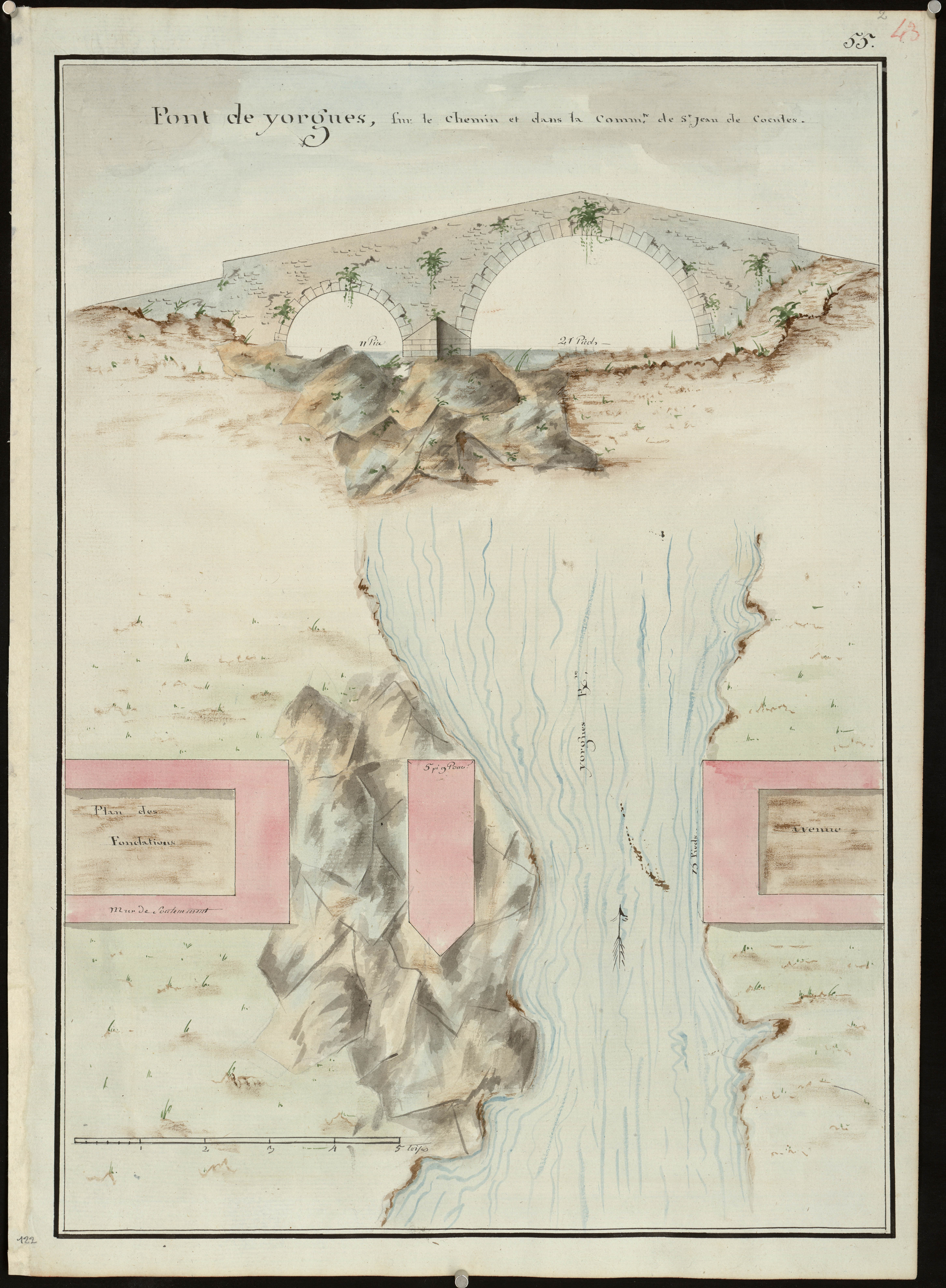 Saint-Jean-de-Cuculles. - Plan, profil et élévation du pont de Vorgues, sur le ruisseau du même nom